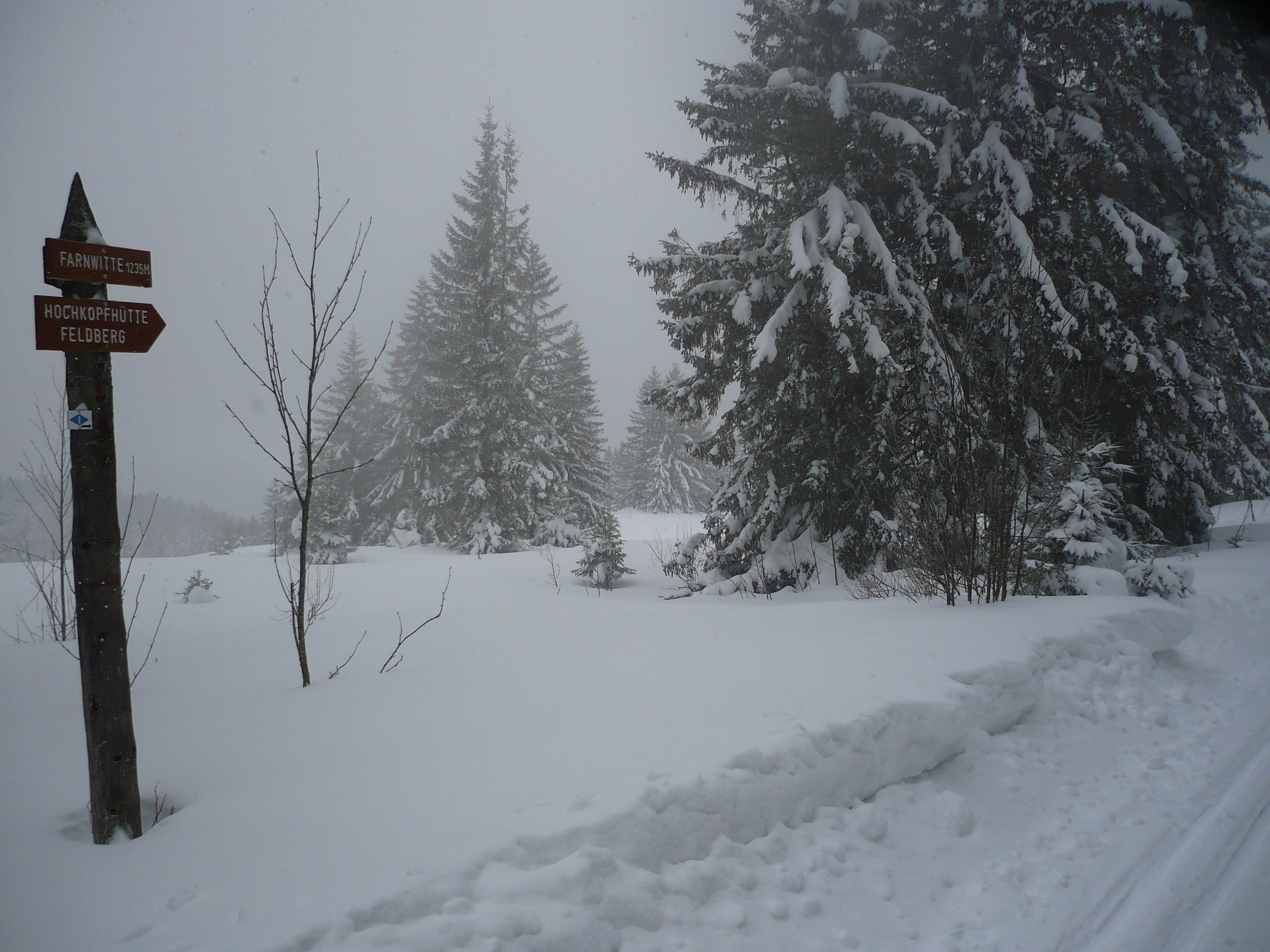 Farnwitte am Fernskiwanderweg Hinterzarten - Schluchsee